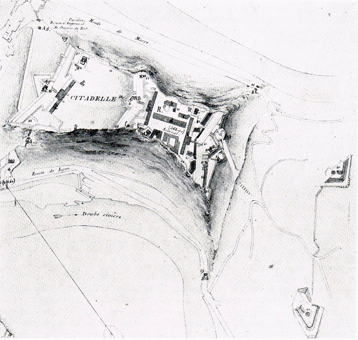 Plan du Génie de la citadelle et des lunettes de Trois-Châtels et de Tousey, dessiné en 1838 et rectifié en 1868.